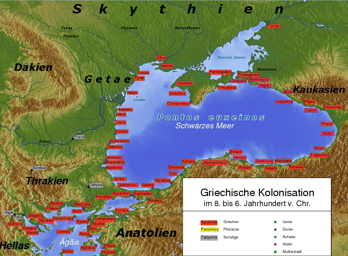 La bildo estas kopiita de de. La originala priskribo estas